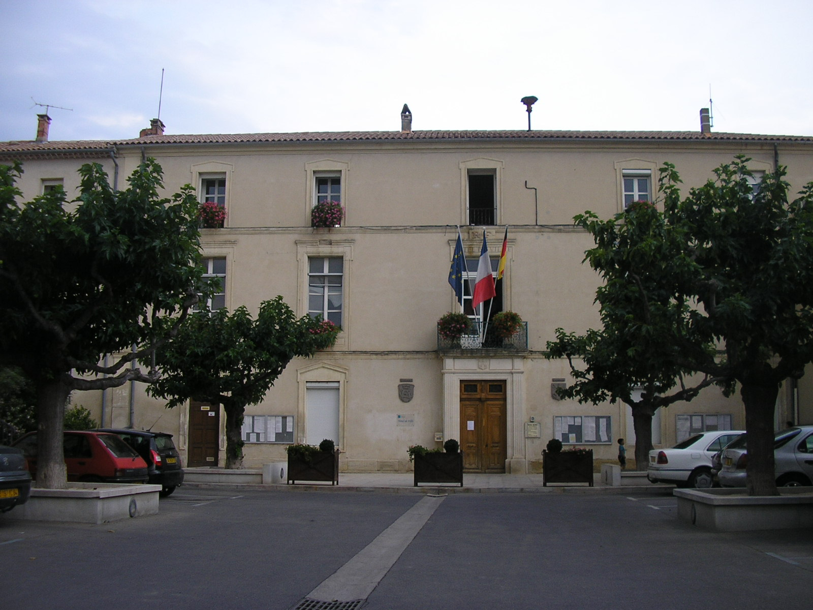 Sarrians Hôtel de ville